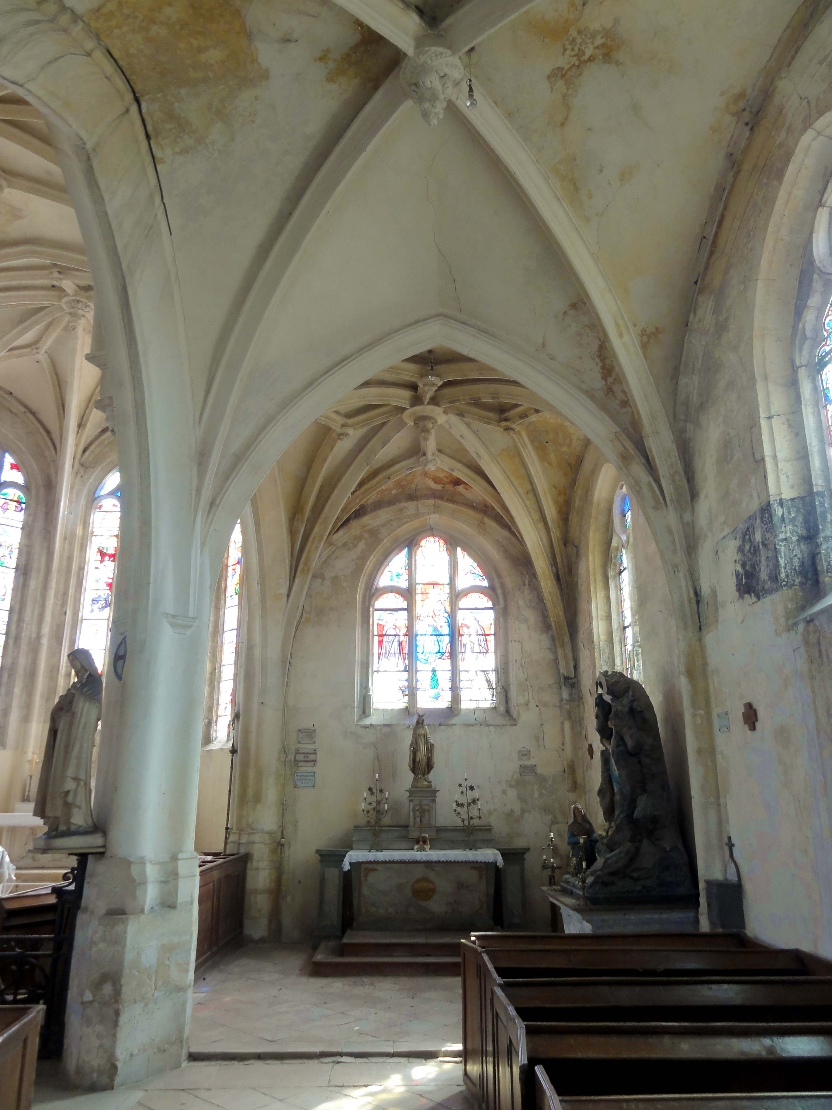 Intérieur de l'église (voir titre).